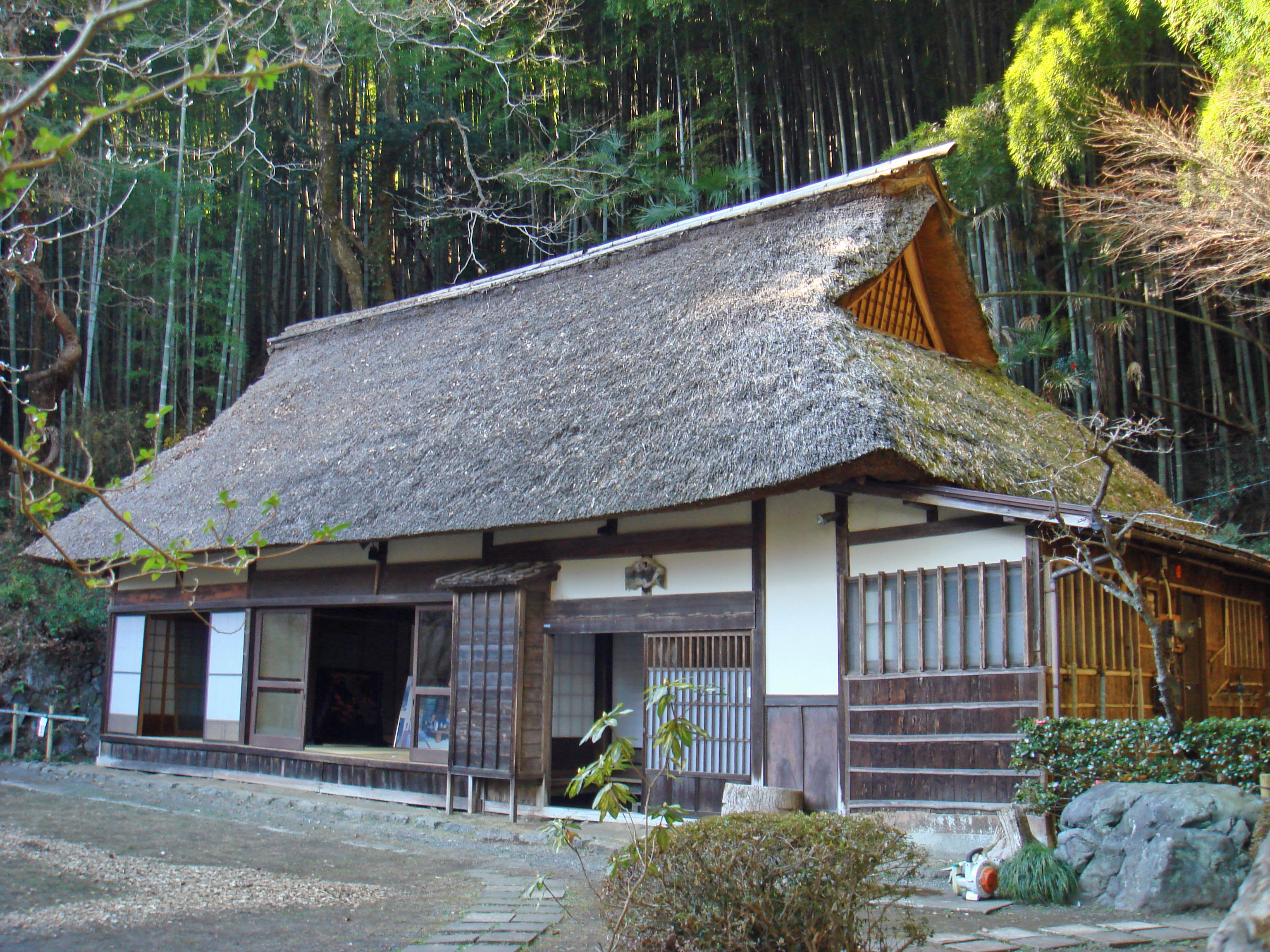 日の出山荘 青雲堂 外観写真